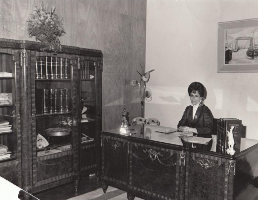 Aída Judith León en su despacho como Primera Dama de Ecuador. Tomado del álbum familiar de los Rodríguez-León.